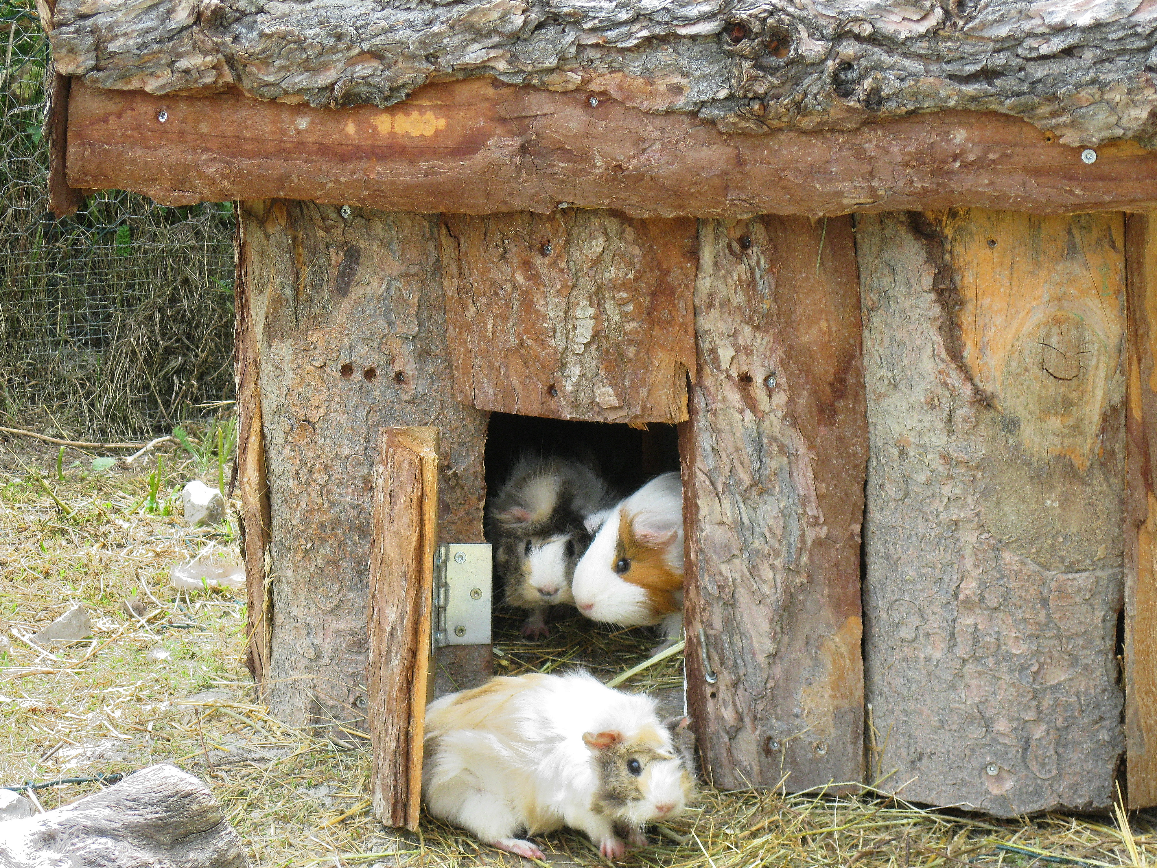 Famille de cochons d'inde.